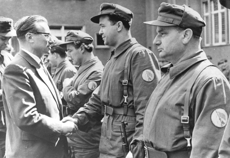 ADN-ZB-Eckebrecht-23.8.1961-Berliner Kampfgruppen während ihres Einsatzes zur Durchführung der Grenzsicherungsmaßnahmen vom 13.8.1961. Kurt Thieme 1. Sekretär der SED-Kreisleitung Berlin-Mitte, besucht eine Kampfgruppeneinheit.